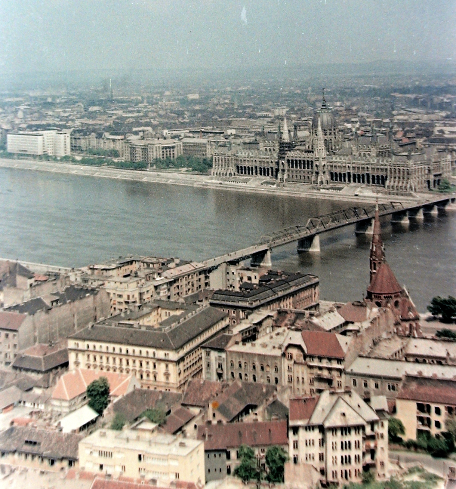 panoráma a Kossuth híddal. Location: Hungary, Budapest Tags: colorful, Kossuth-bridge, parliament Title: panoráma a Kossuth híddal.